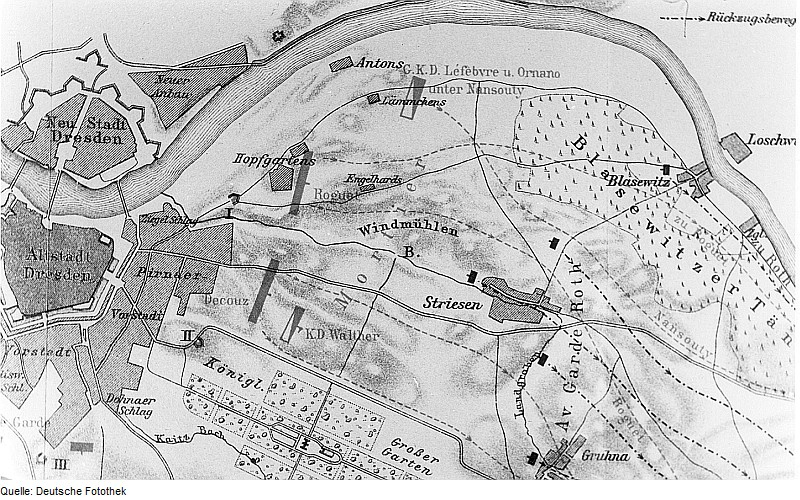 Original image description from the Deutsche Fotothek Dresden-Striesen. Plan zur Schlacht bei Dresden, aus: Friedrich: Die Befreiungskriege, 1911